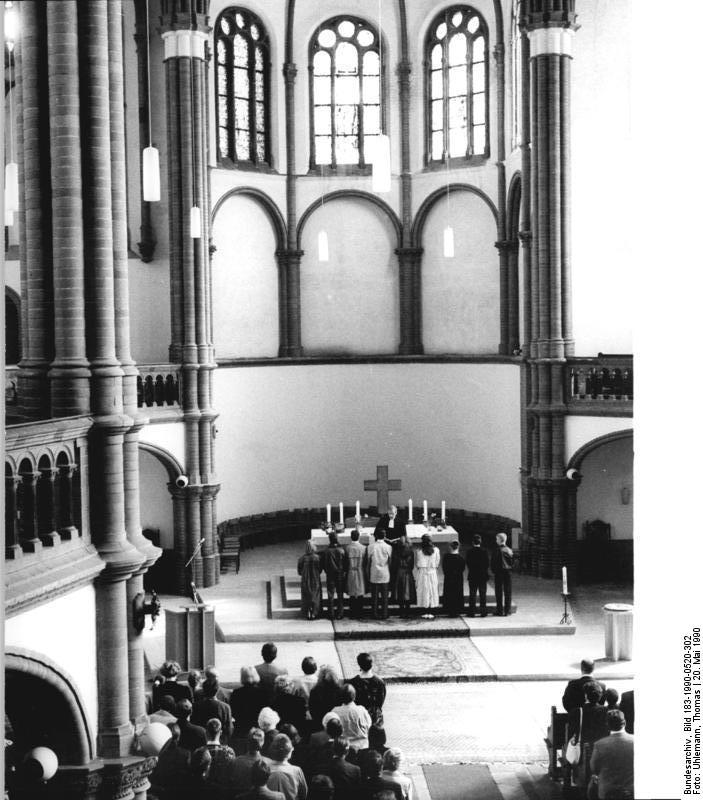 20.5.90 Berlin: Während eines feierlichen Gottesdienstes in der Gethsemanekirche wurden am Sonntag neun Jugendliche konfirmiert.